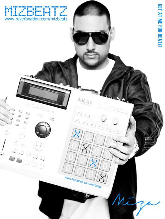 MIZBEATZ